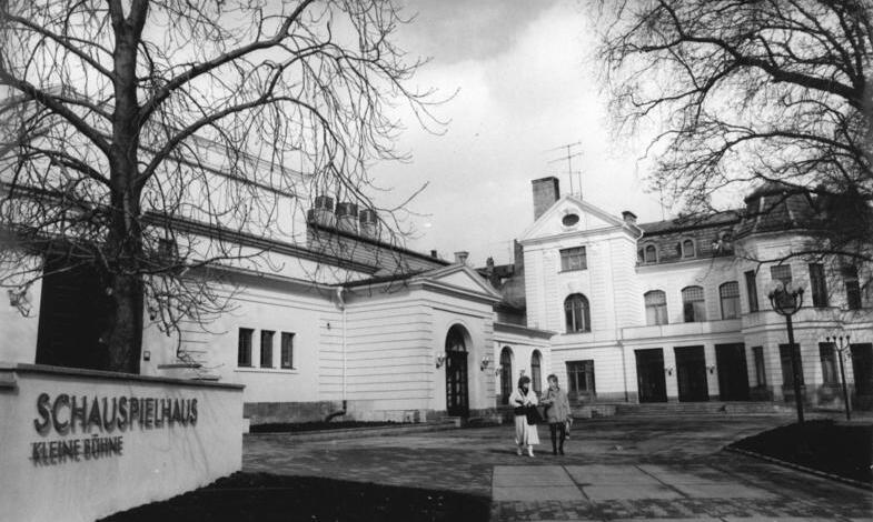 ADN-ZB-Hirndorf-18.3.1988-Erfurt: Das Erfurter Schauspielhaus wurde kürzlich nach umfangreichen Umbauten wiedereröffnet. Das Theater mit 422 Plätzen verfügt nach der Rekonstruktion über nahezu ideale Auffrührungsbedingungen. Es wurde vor fast 100 Jahren als Ballhaus errichtet und wird seit 1949 als Theater genutzt. Jetzt besitzt es eine variable Bühne mit einer computergesteuerten Beleuchtungsanlage. Auch die Arbeits- und Aufenthaltsbedingungen für die Schauspieler haben sich verbessert. (siehe 26N)